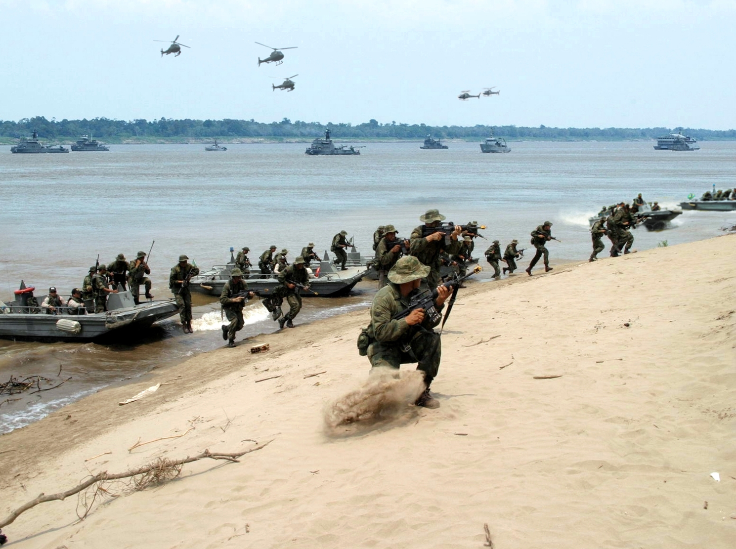 Arquivo liberado pela Marinha do Brasil através de projeto GLAM com Wiki Educação Brasil